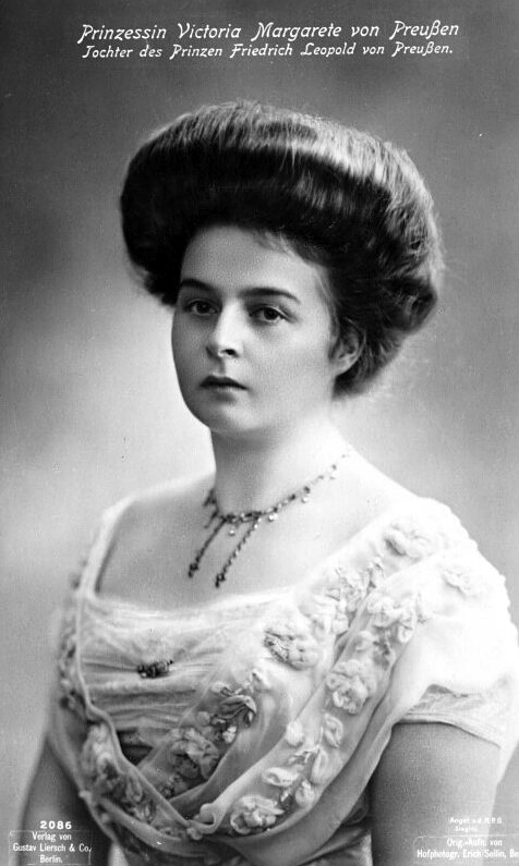 Prinzessin Viktoria Margarete von Preußen